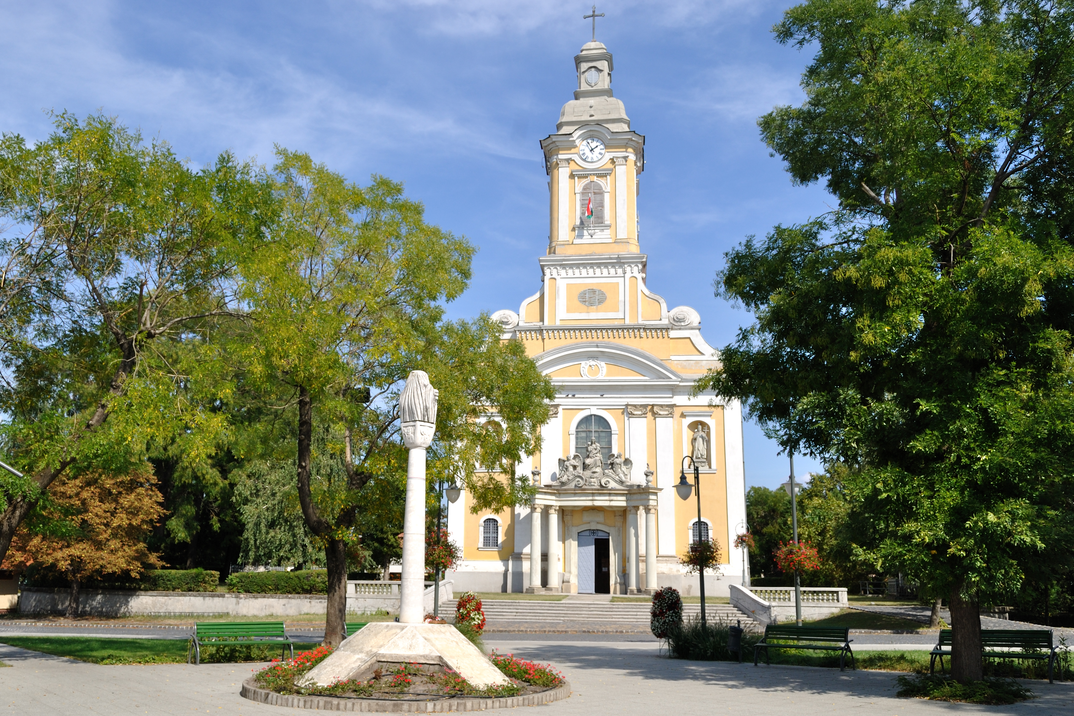 Római katolikus templom (Abony, Kossuth tér) This is a photo of a monument in Hungary, Identifier: 6867